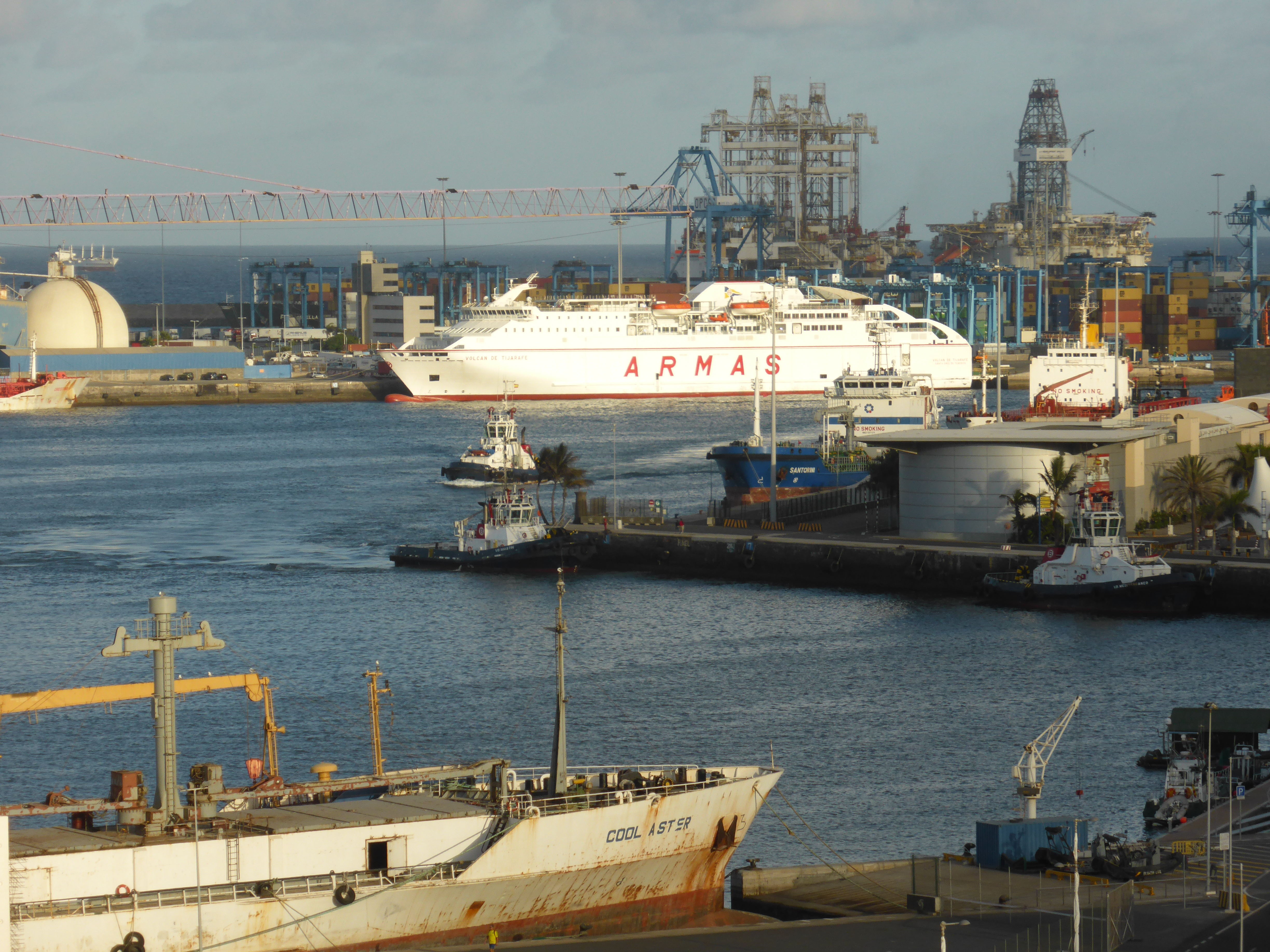 Movimiento portuario. Al medio vemos remolcadores. Más lejos, con el casco pintado en blanco, se encuentra el ferry "Volcán de Tijarafe", de la Naviera "ARMAS", que realiza el trayecto Las Palmas - Santa Cruz de Tenerife. Y al fondo del todo vemos altas torres de plataformas perforadoras petrolíferas, temporalmente atracadas en el puerto, en espera de contratos.